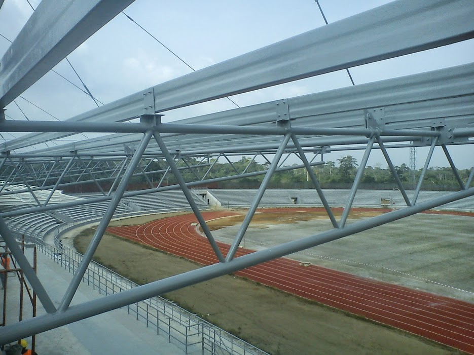 Stade de Mongomo